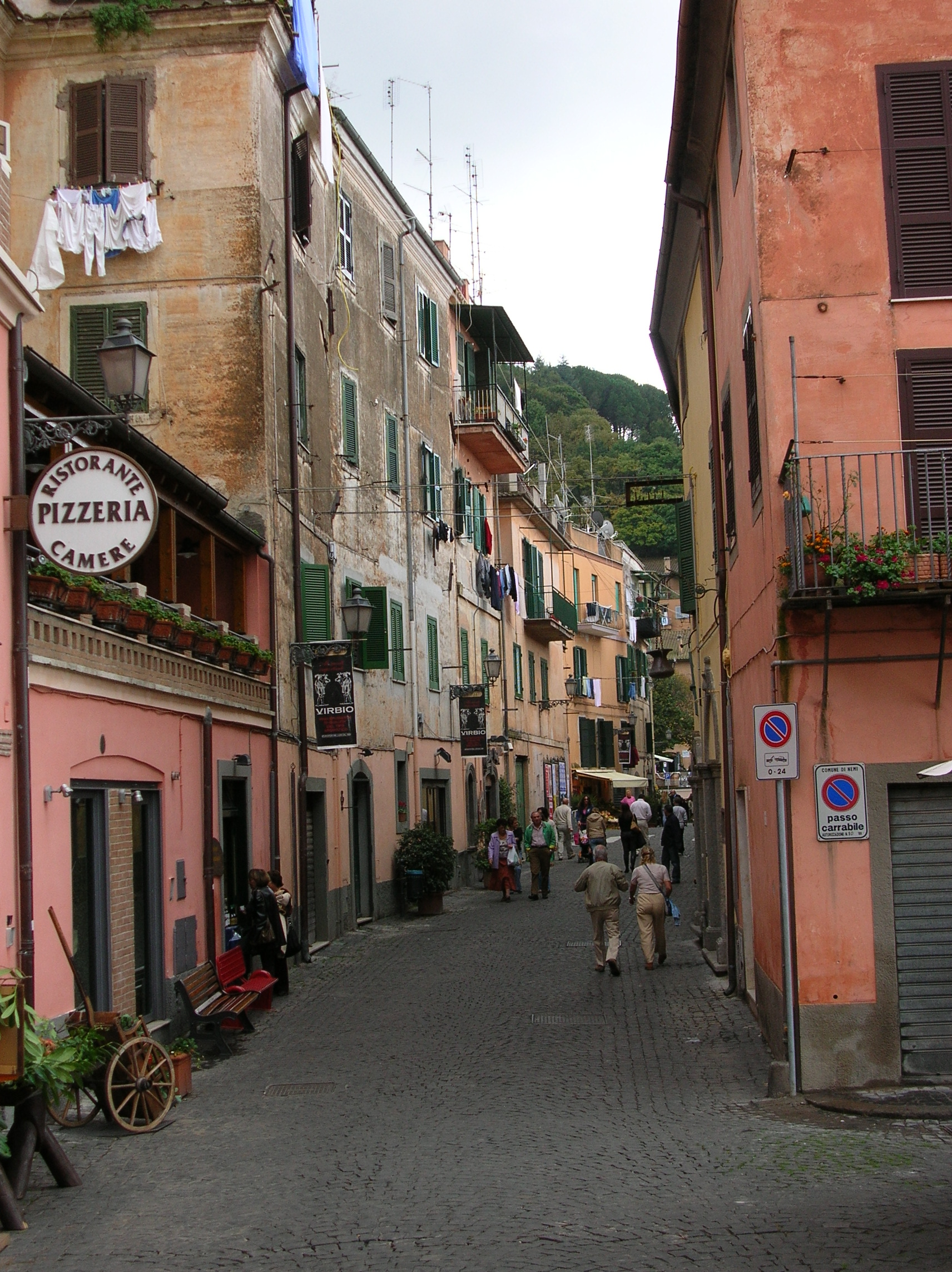 Nemi, il corso centrale